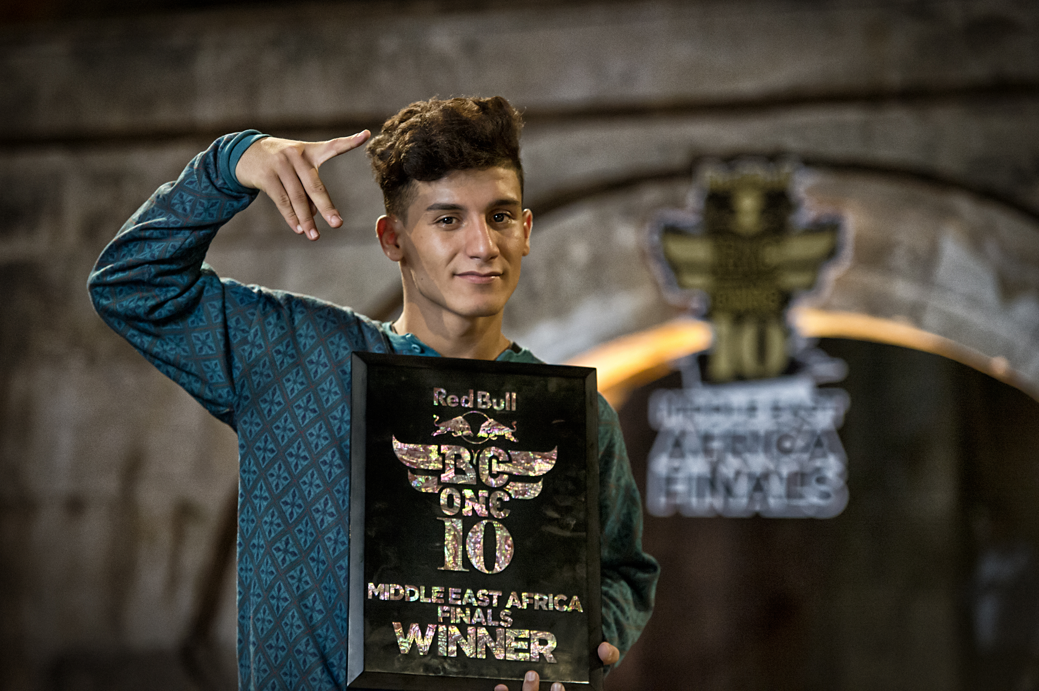 Lilzoo alias Fouad Amblej